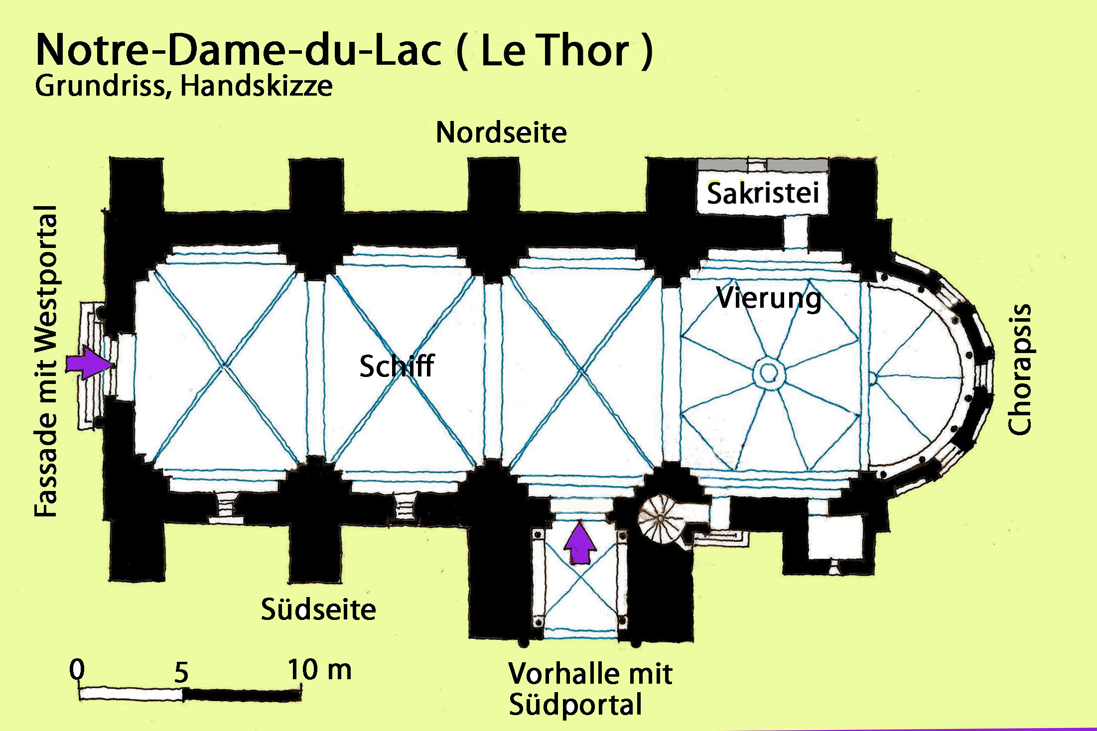 ND-du-Lac (Le Thor)